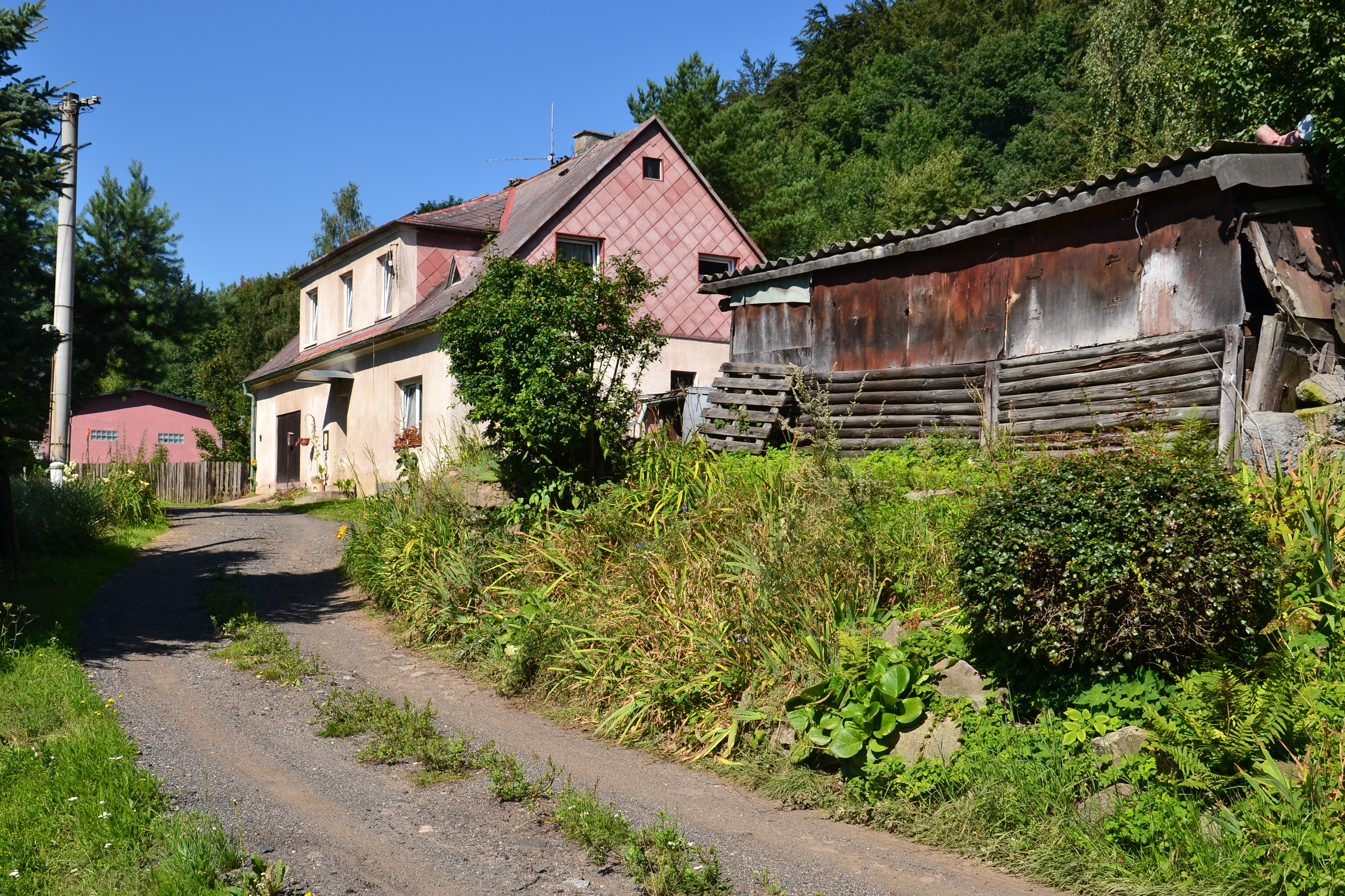 Dům čp. 10